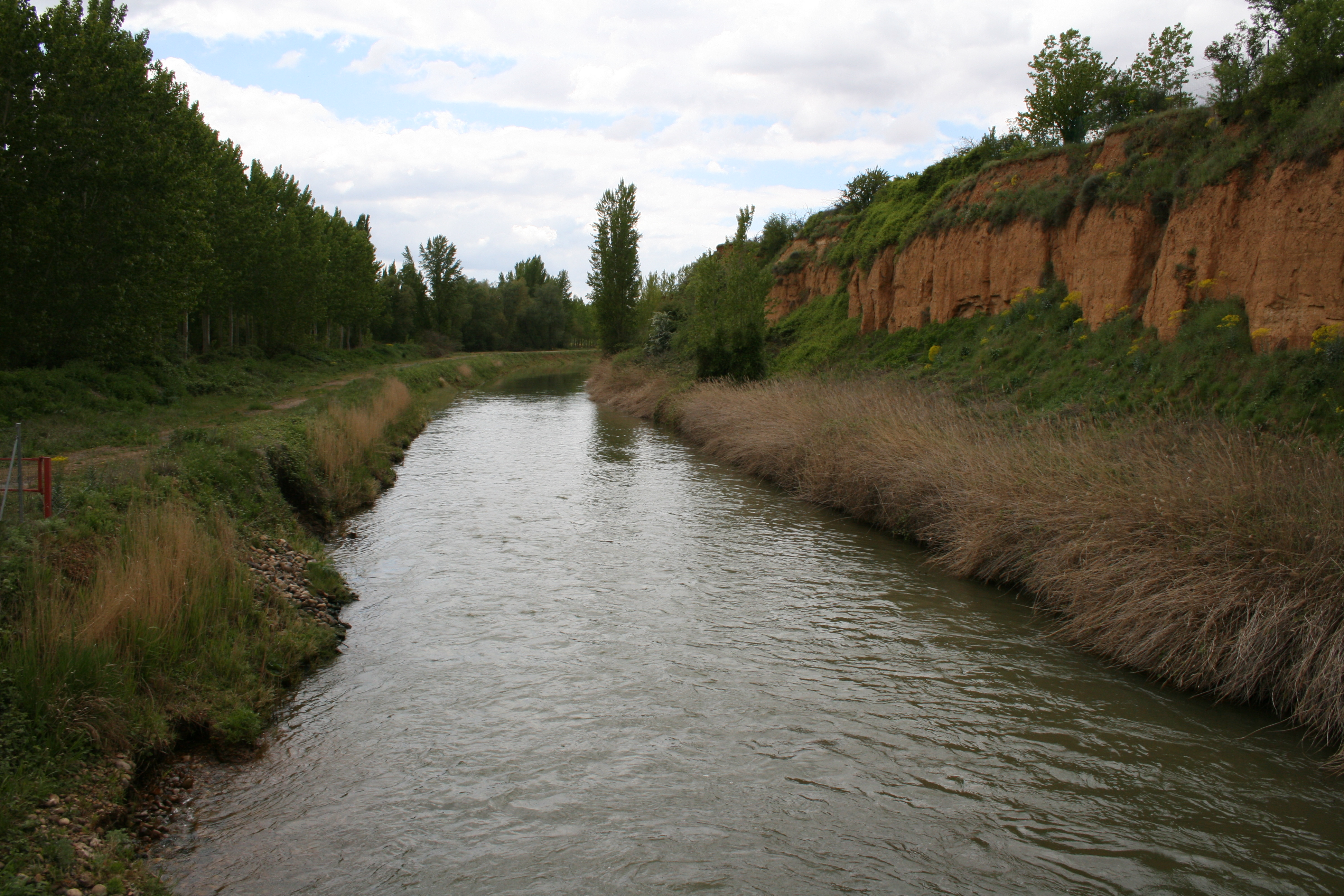 Parte inicial del Canal del Esla cerca de Benamariel; cauce todavía en tierra